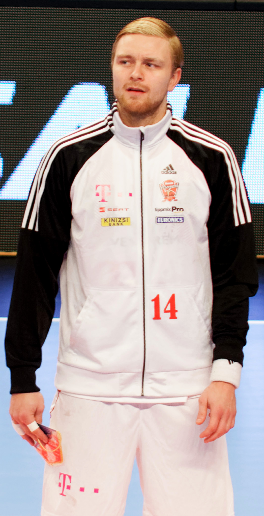 Rencontre de phase de groupe entre le PSG et Veszprem; A Coubertin, le 27 novembre 2016.